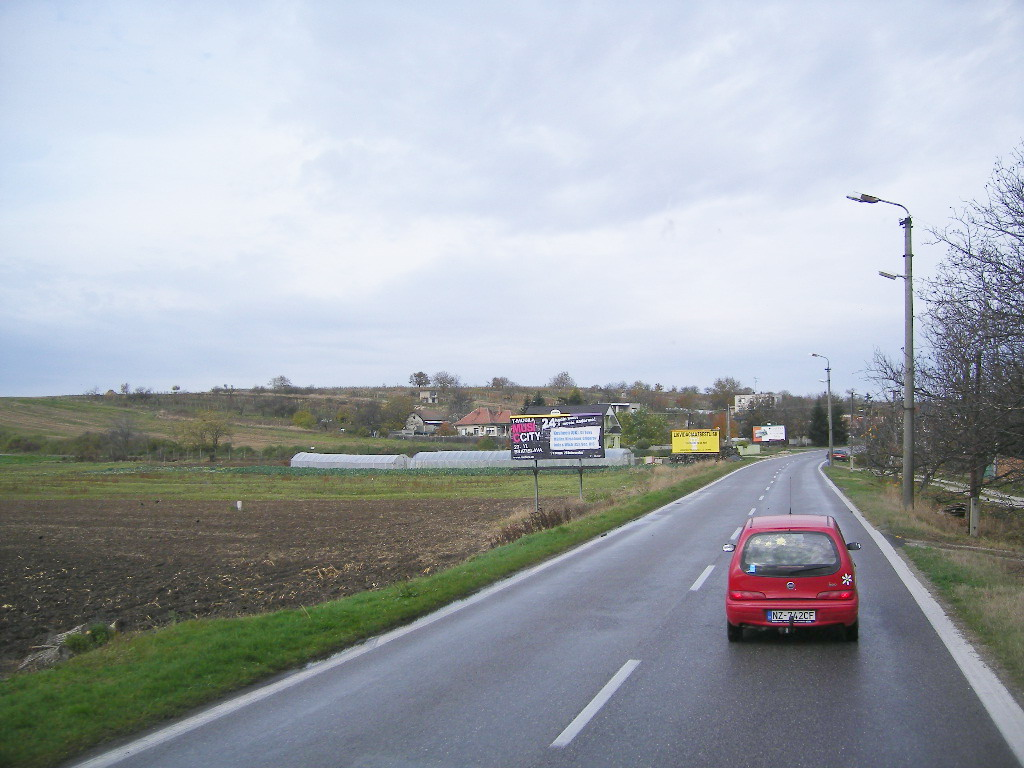 Nagykér - 64-es út